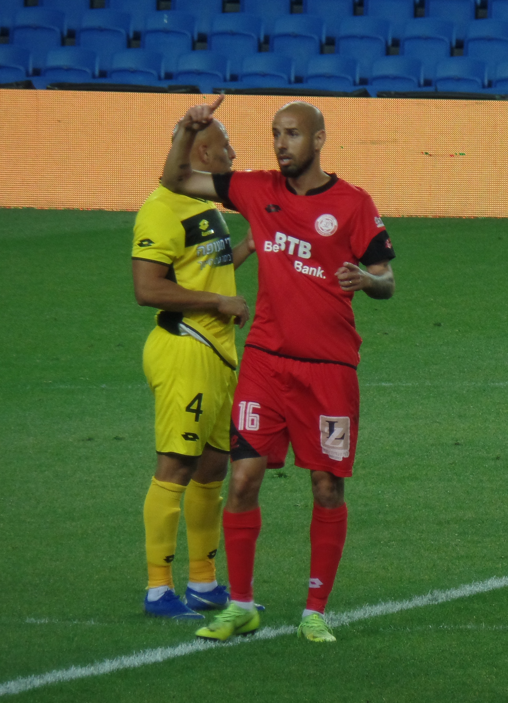 דובב גבאי במדי הפועל חדרה